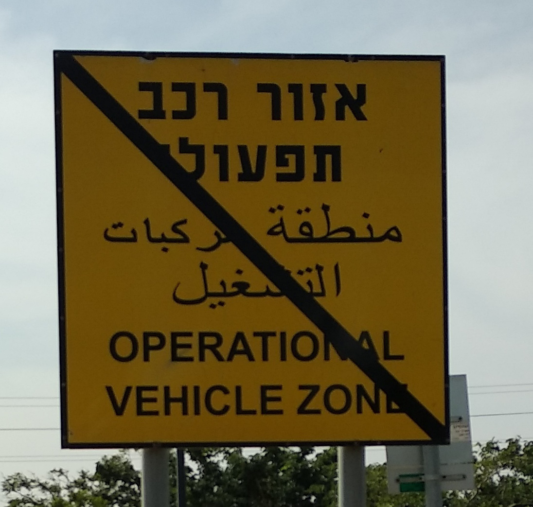 שלט סוף אזור רכב תפעולי